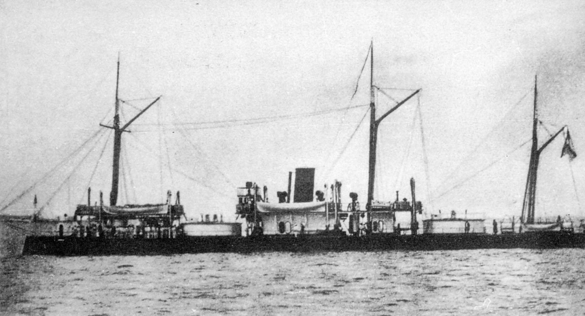 Броненосный башенный фрегат «Адмирал Спиридов».